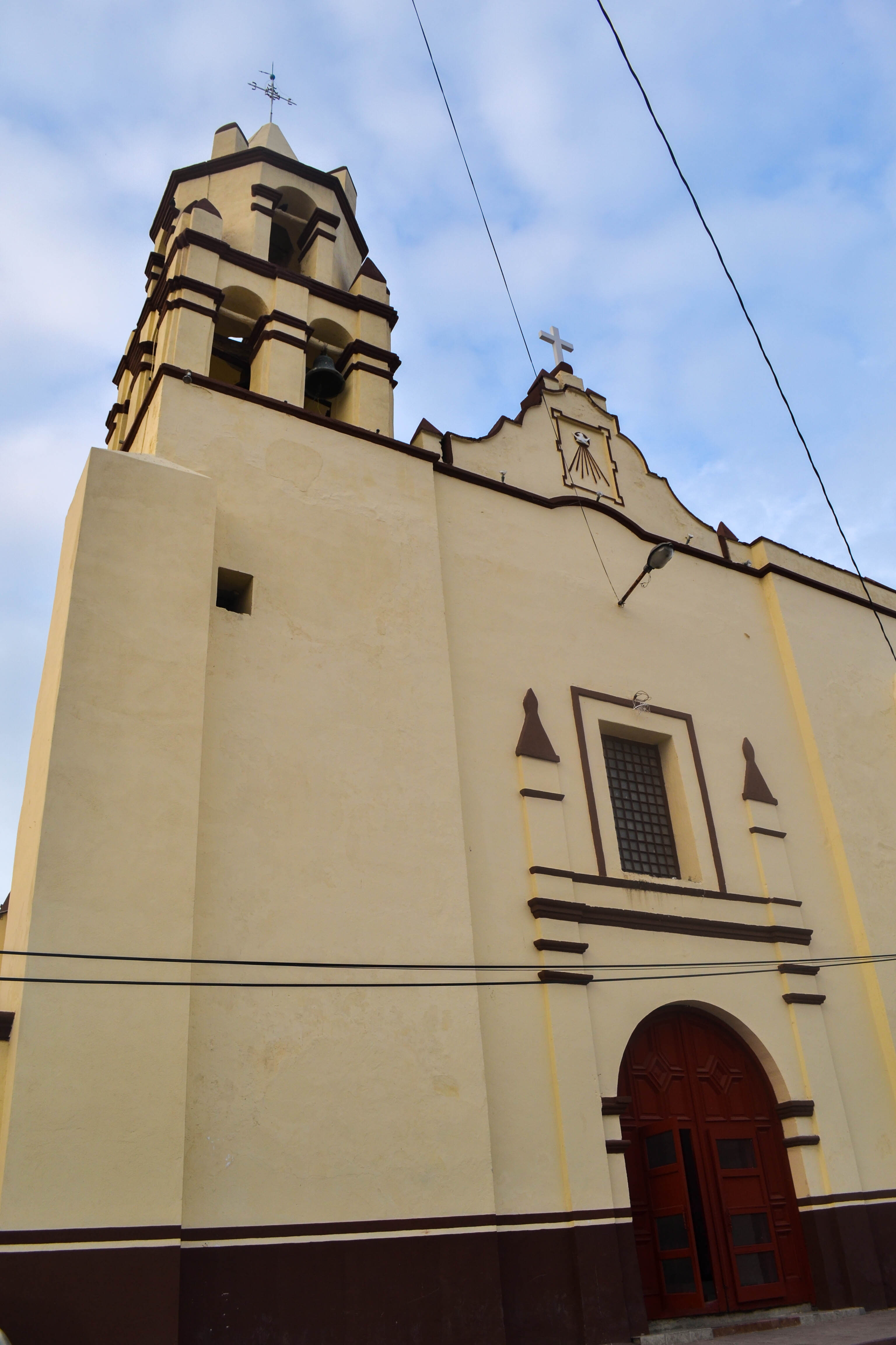 Parroquia Santiago Apóstol en Ciudad Valles, San Luis Potosí. Ubicada en la zona centro.